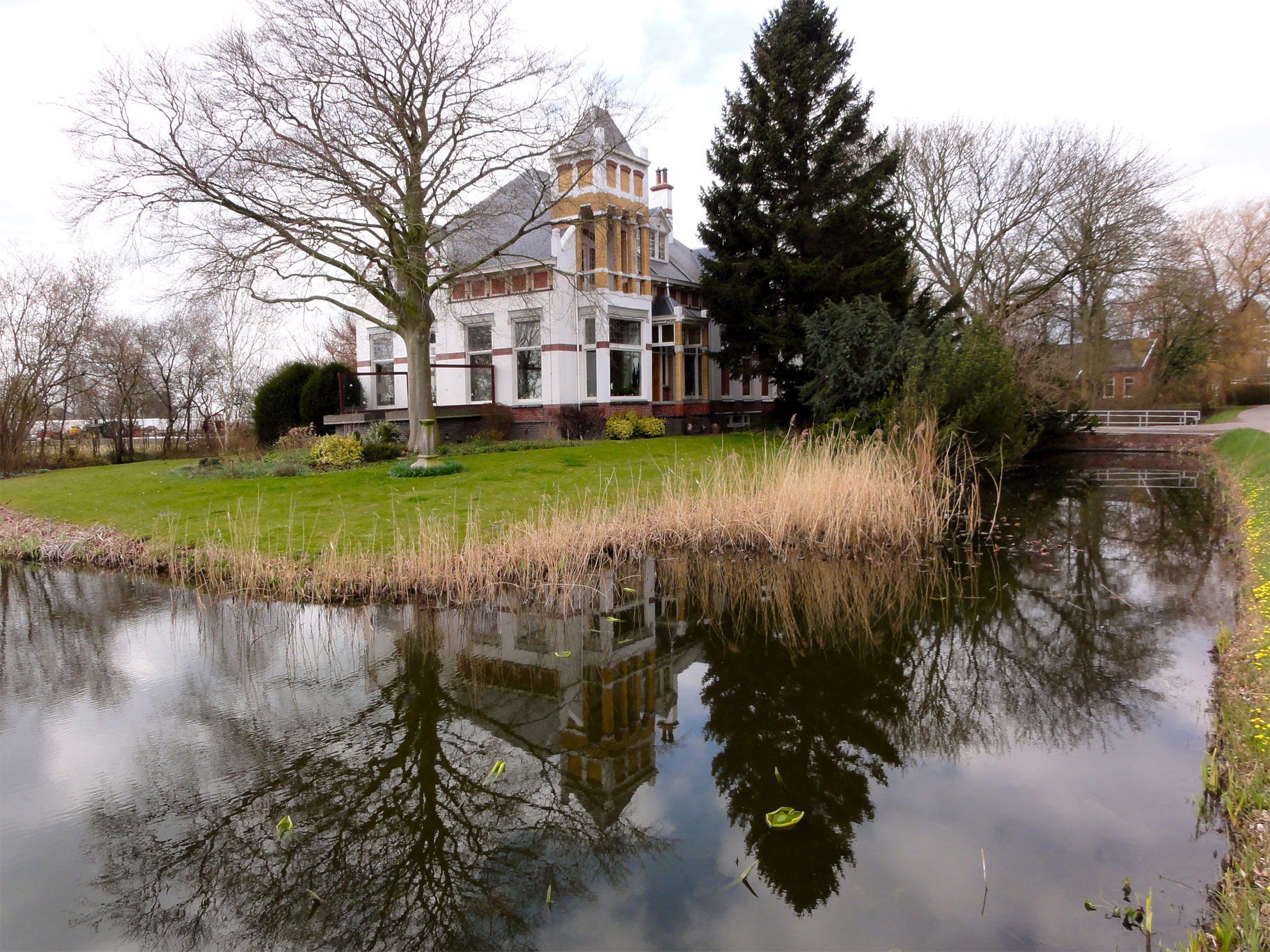 Villa Barmerweg1 Doodstil